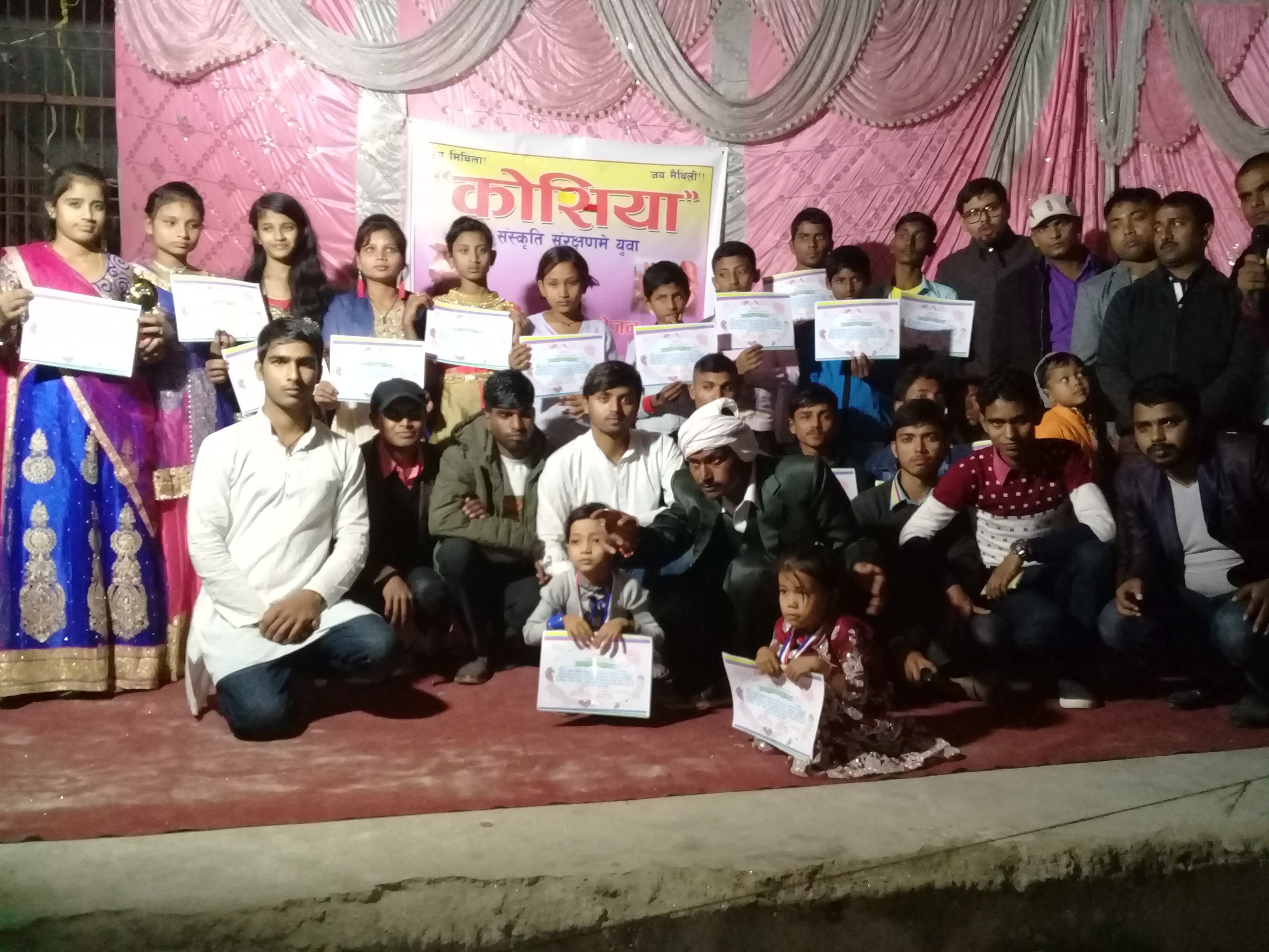 sangor